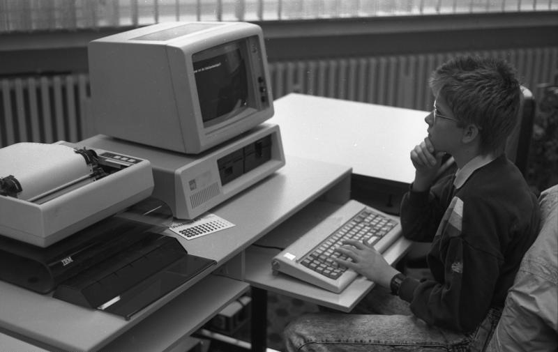 6.4.1988 Tag der offenen Tür in der Computer-Schule der Sparkasse Bonn